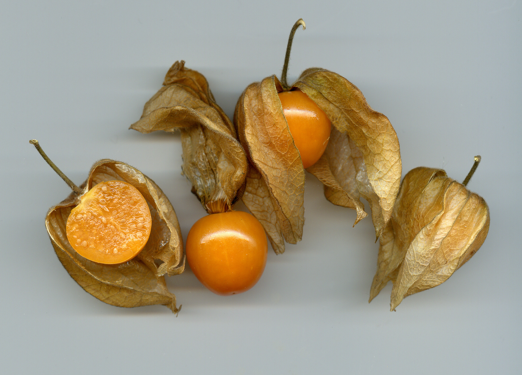 Physalis oder Kapstachelbeere. Eigene Aufnahme, Public Domain